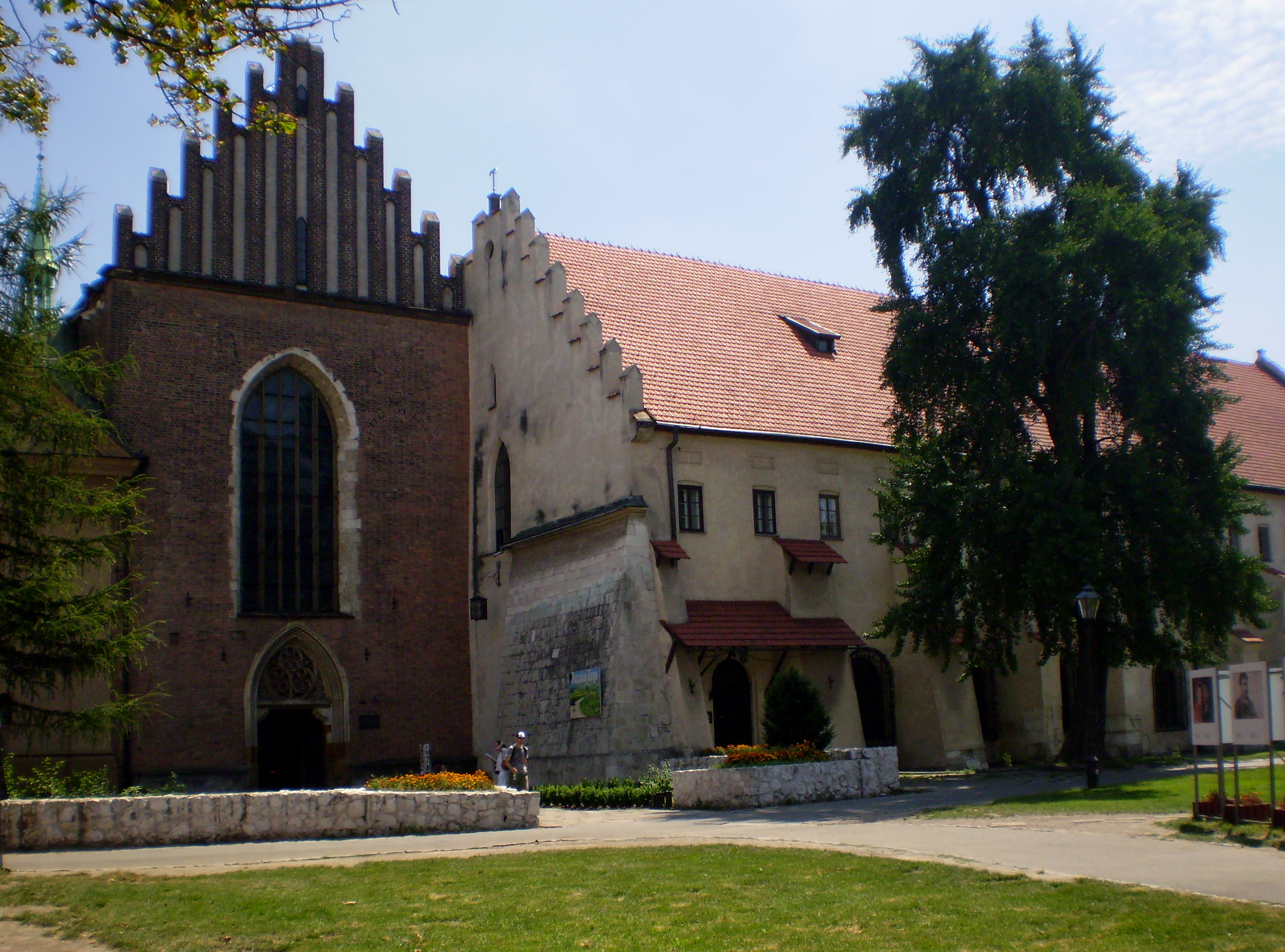 Franciszkańska in Kraków, Poland